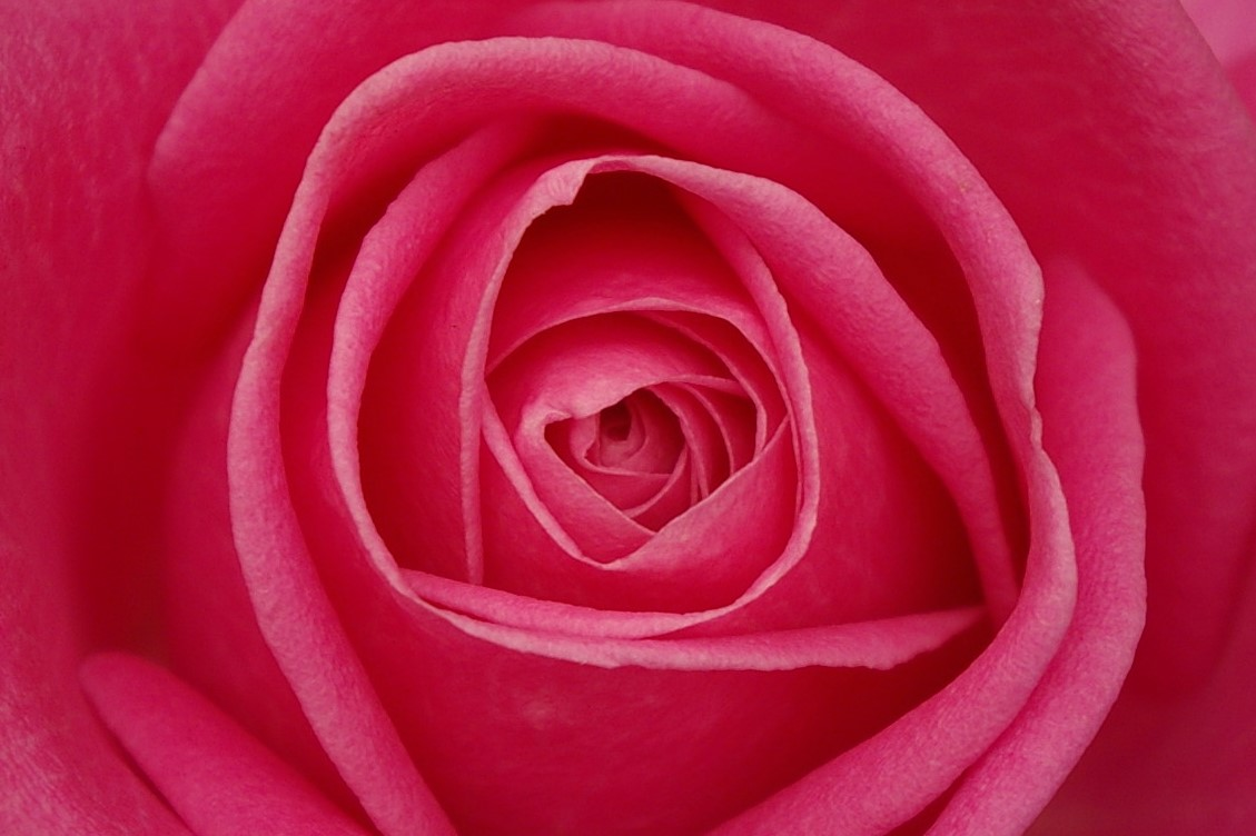 Rose Petals